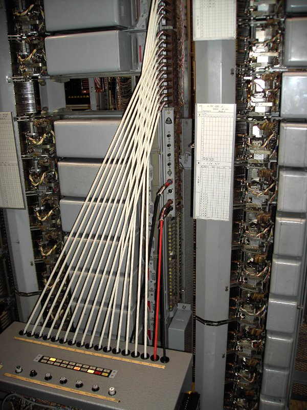 Fahrbare Fangschaltung mit Verbindungskabel am Leitungswähler angeschlossen